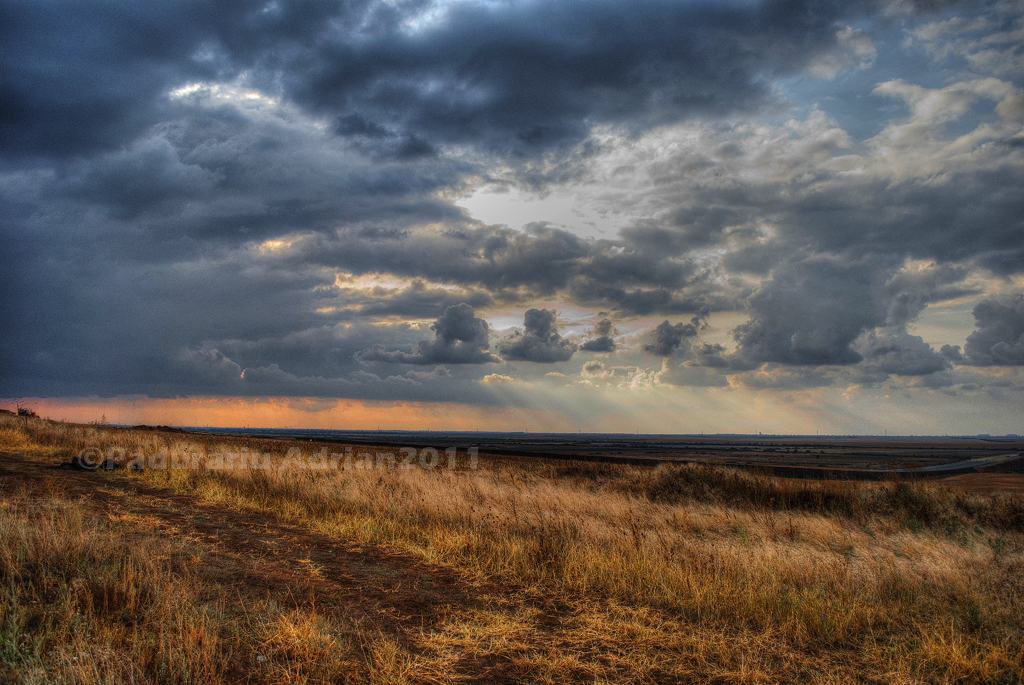 Autumn landscape